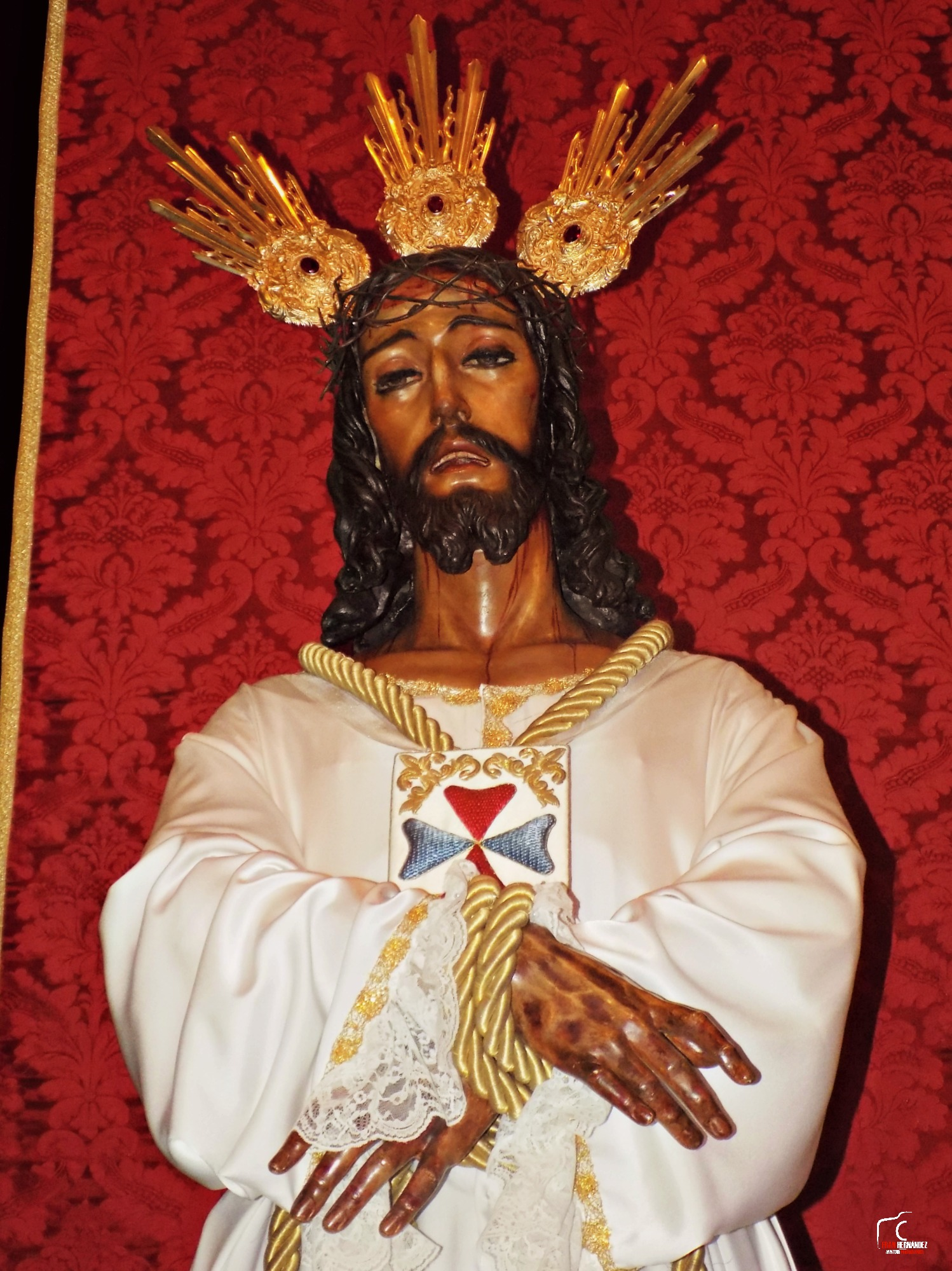 Ntro. Padre Jesús Cautivo (Málaga)